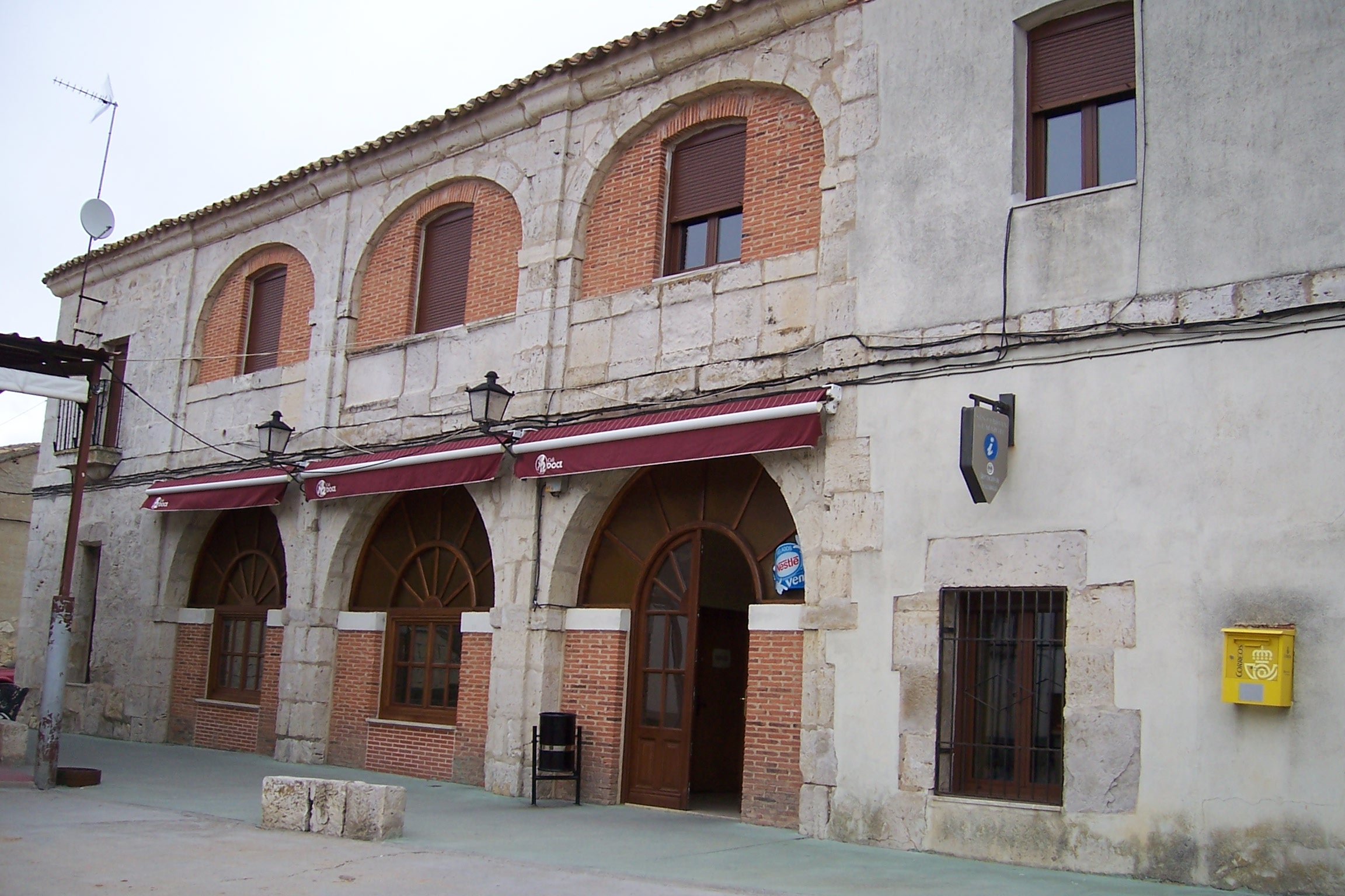 Ayuntamiento en la localidad de San Cebrián de Mazote, provincia de Valladolid, España.